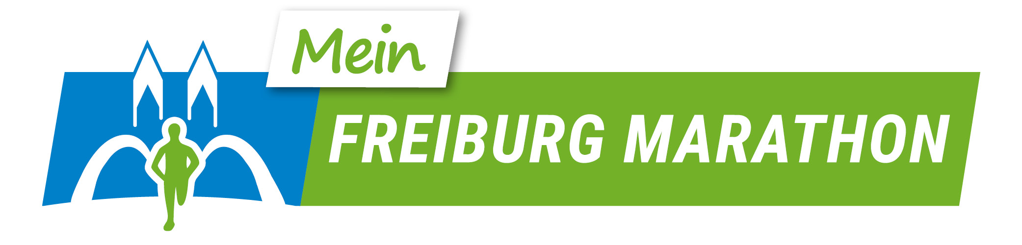 Logo Freiburg Marathon